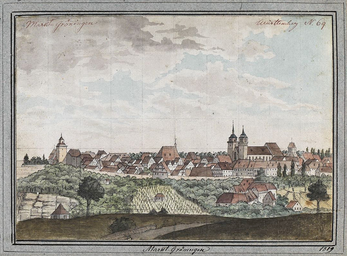 "Markt-Gröningen". Ansicht der Stadt Markgröningen von Südwesten